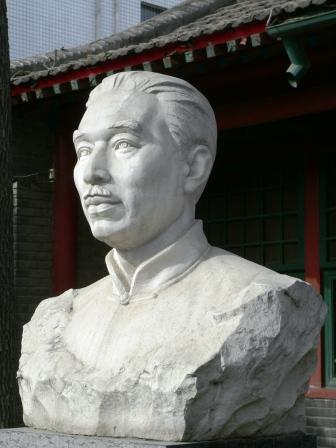 茅盾头像 自己拍摄